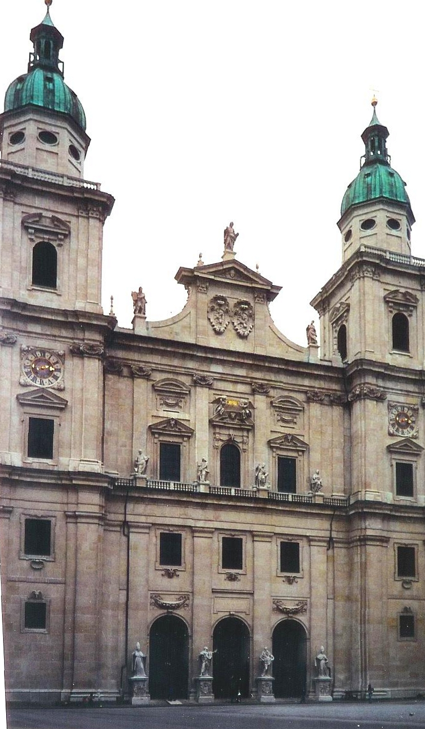 Salzburg (Dom) Facade (West)